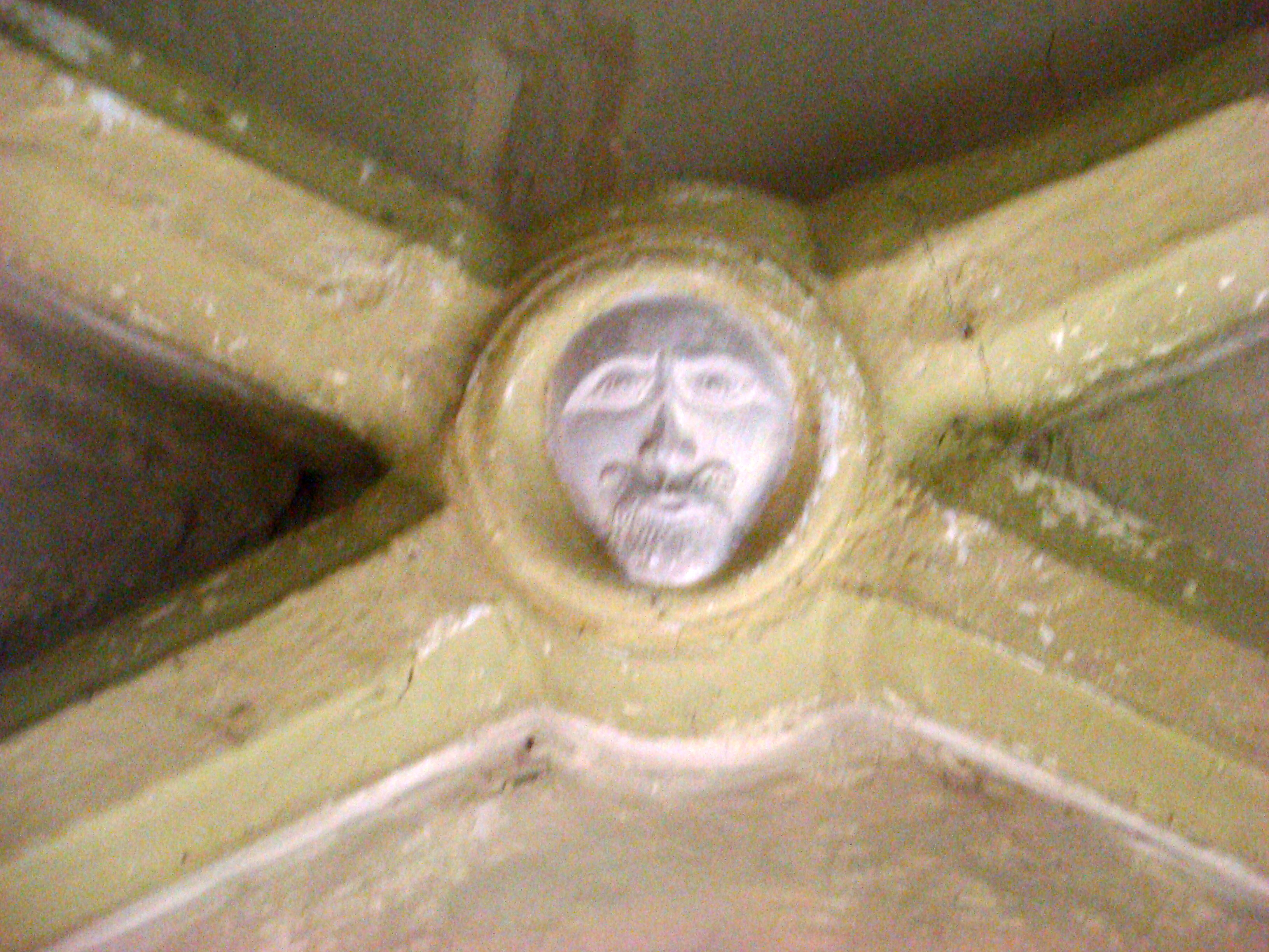 Ansamblul bisericii evanghelice fortificate, sat CURCIU; comuna DÂRLOS